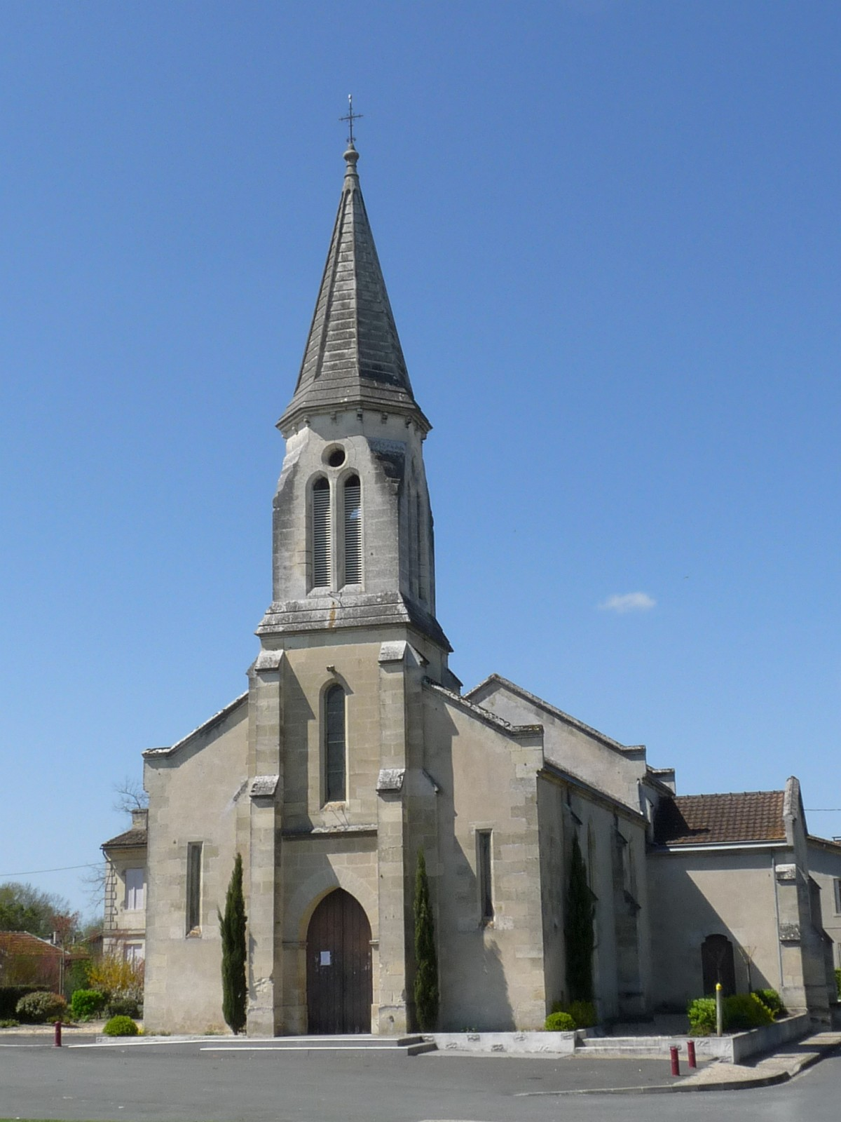 Eglise des Eglisottes, Gironde, France